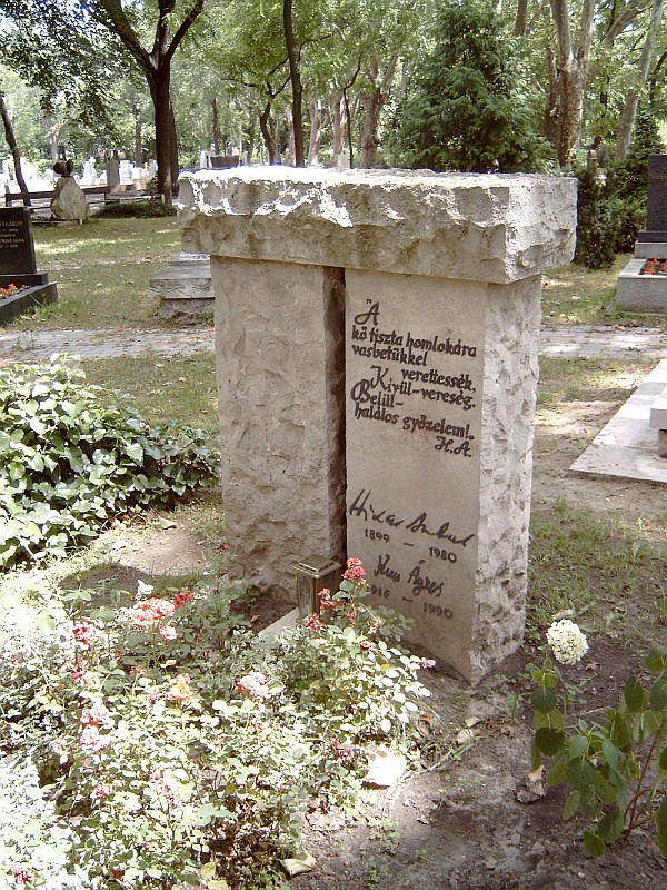 Hidas Antal és Kun Ágnes sírja Budapesten. Kerepesi temető: 42/1.